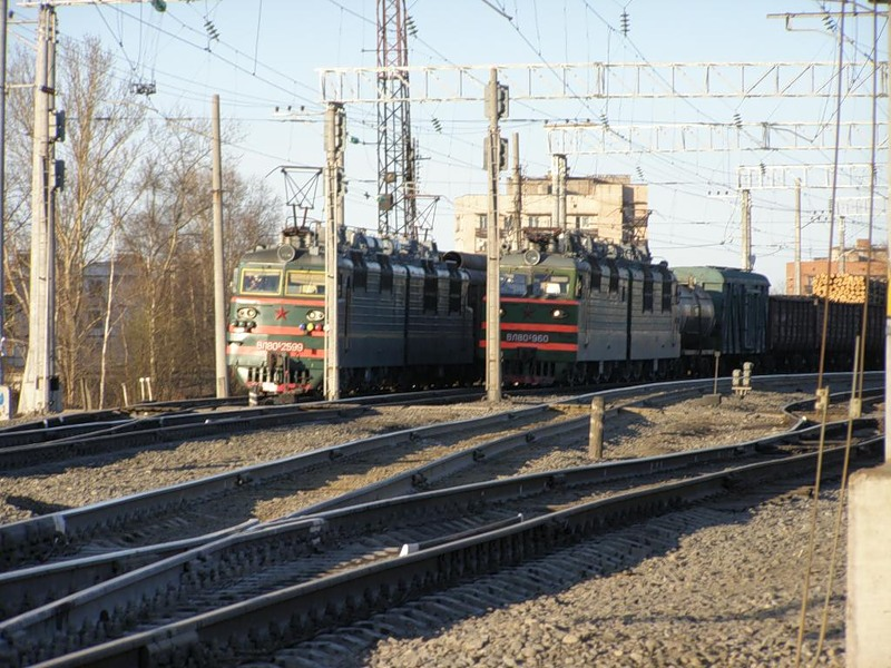 Электровозы ВЛ80С-2599 и ВЛ80Т-960 на станции Голиковка.